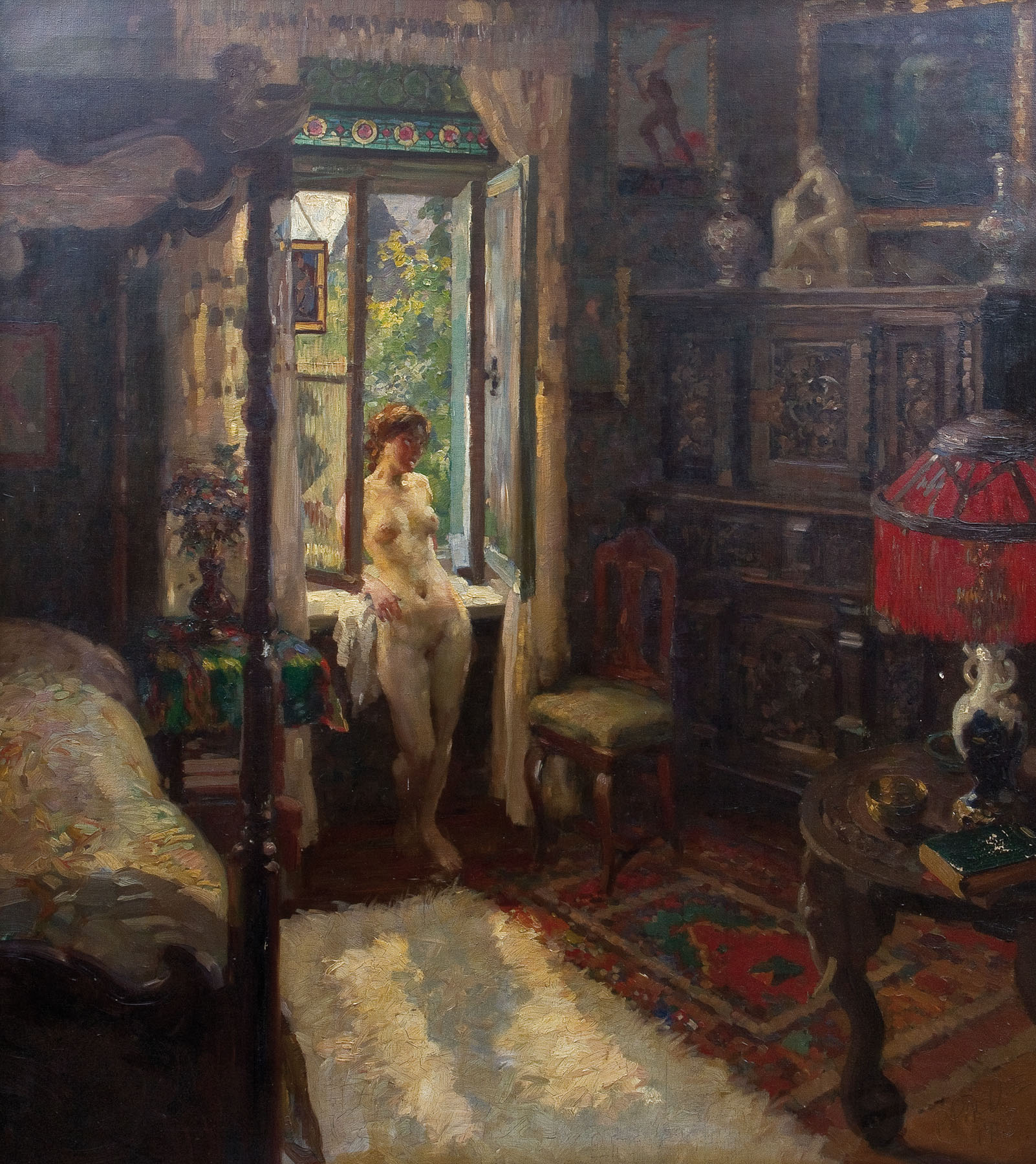 Am geöffneten Fenster stehender Mädchenakt. Öl auf Leinwand, unten rechts signiert und datiert P. PAEDE 1913. 90 x 100 cm